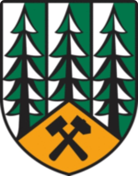 Das Wappen der Gemeinde Wald am Schoberpaß wurde 1970 gestaltet. Der Grundgedanke der Wappenlegung für Wald war, den Ortsnamen im Wappen widerzuspiegeln. Die zwei gekreuzten Hämmer sollen den Magnesitbergbau und die drei Tannen den Namen des Ortes "Wald" symbolisieren.